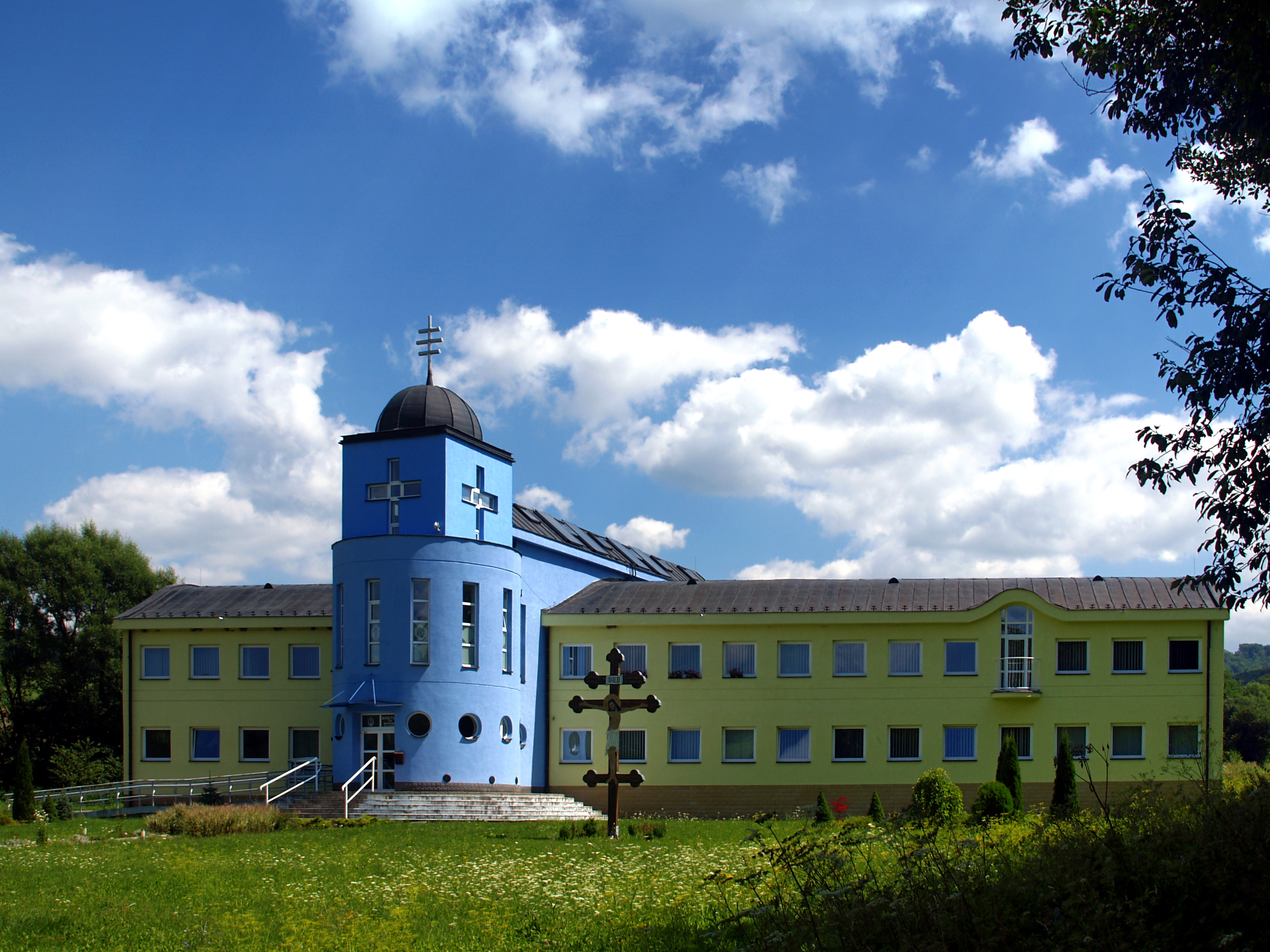 Krásny Brod, Prešov (Slovaquie) - Le nouveau monastère